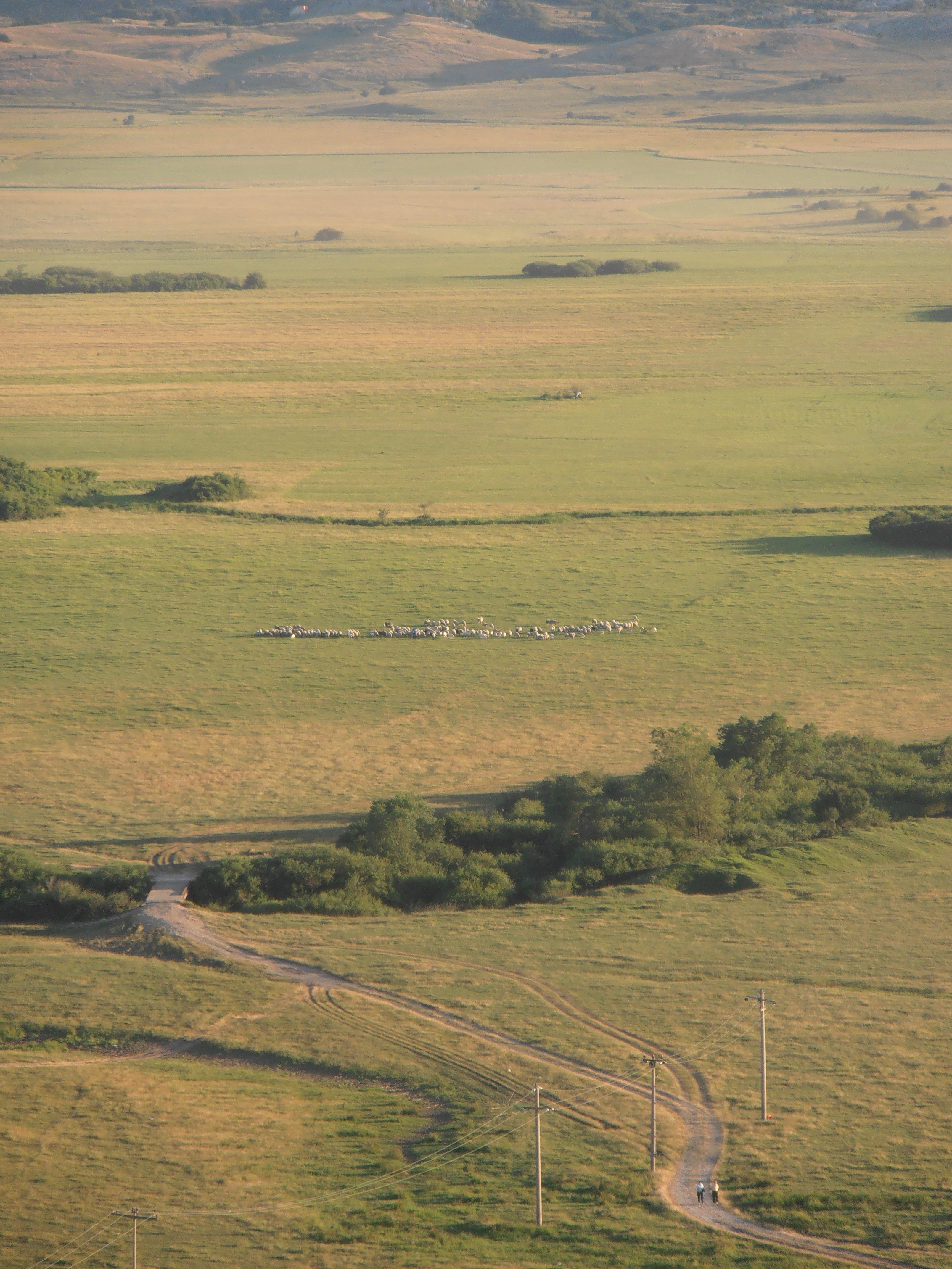 PUP015 Veliki dio Gatačkog polja još uvjek posjećuje mali broj ljudi - tek poneki čobanin, zaljubljenik u prirodu ili fotograf poput mene.